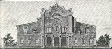 Teatre Balear construït el 1909 a l'actual Plaça Comtat de Rossello núm.4 de Palma de Mallorca (Illes Balears), obra de Joaquim Raspall (molt transformat).